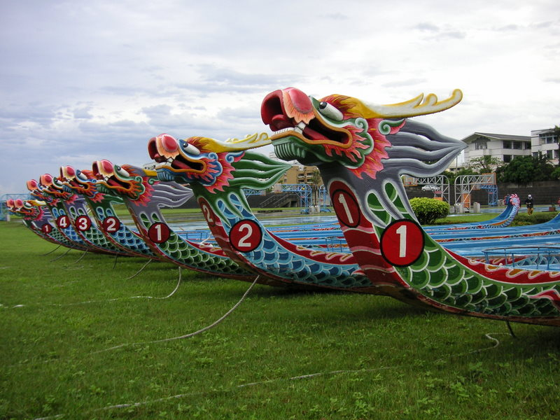 Dragon boats in Taiwan